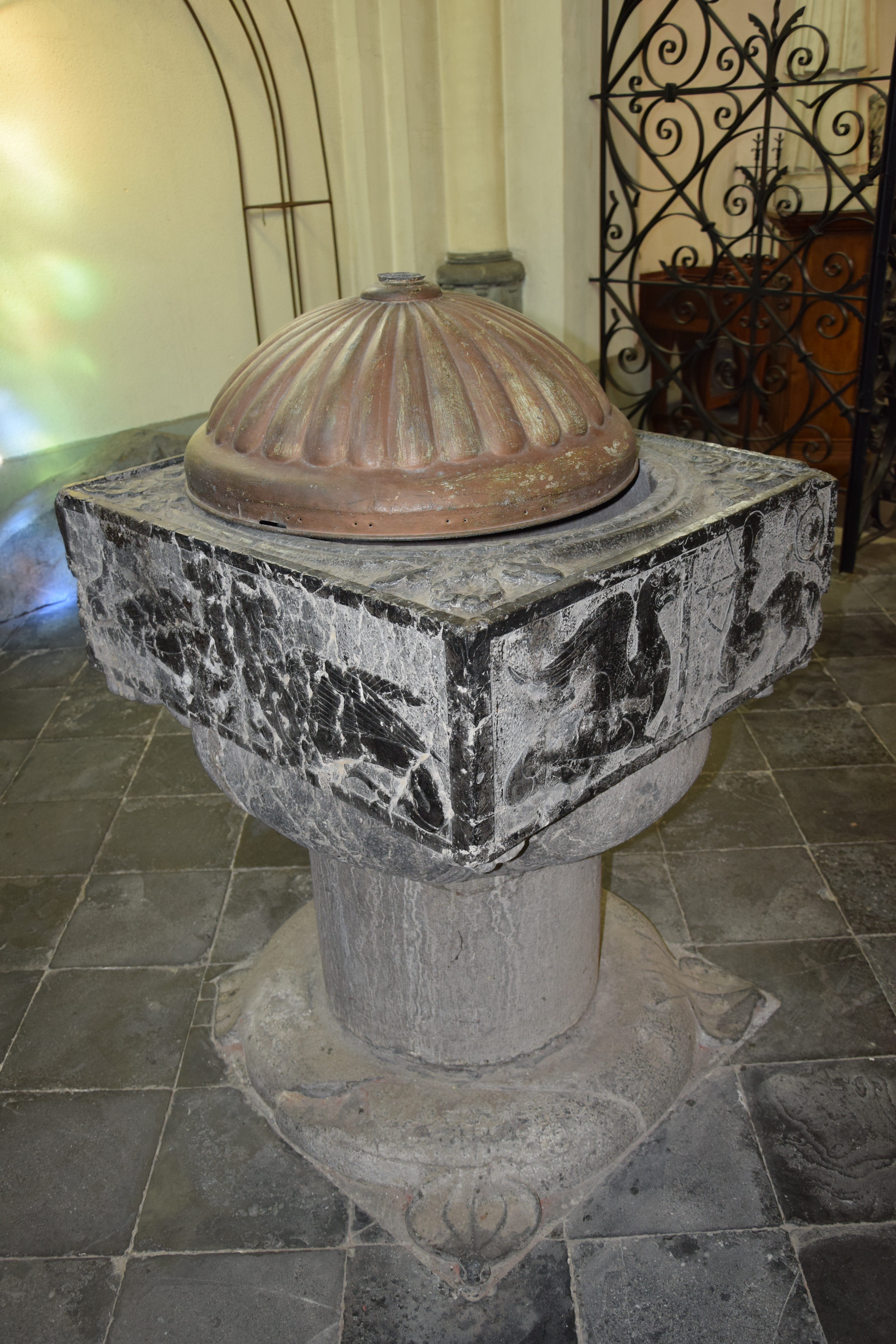 Eglise Notre-Dame-de-l'Assomption de Hautmont IM59000692